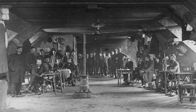 Plounéventer : dortoir d'internés à Kerbénéat (Edouard Brissy, photo du 7 mars 1916